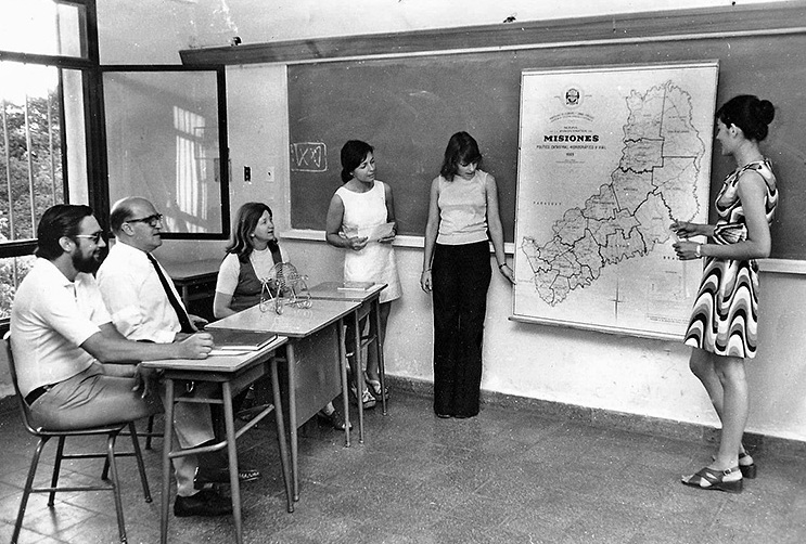 Primer examen tomado en el Instituto Superior Antonio Ruiz de Montoya de la ciudad de Posadas, Misioens, Argentina.